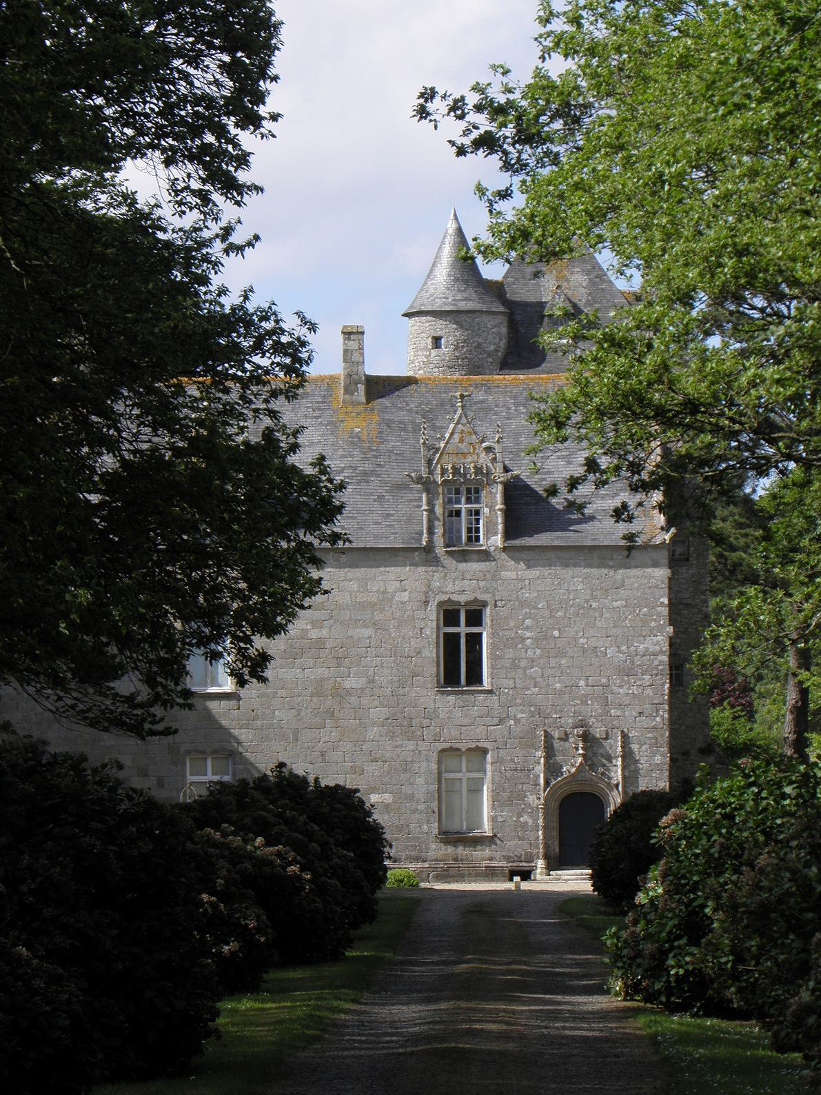 Château de Penmarc'h en Saint-Frégant (29).